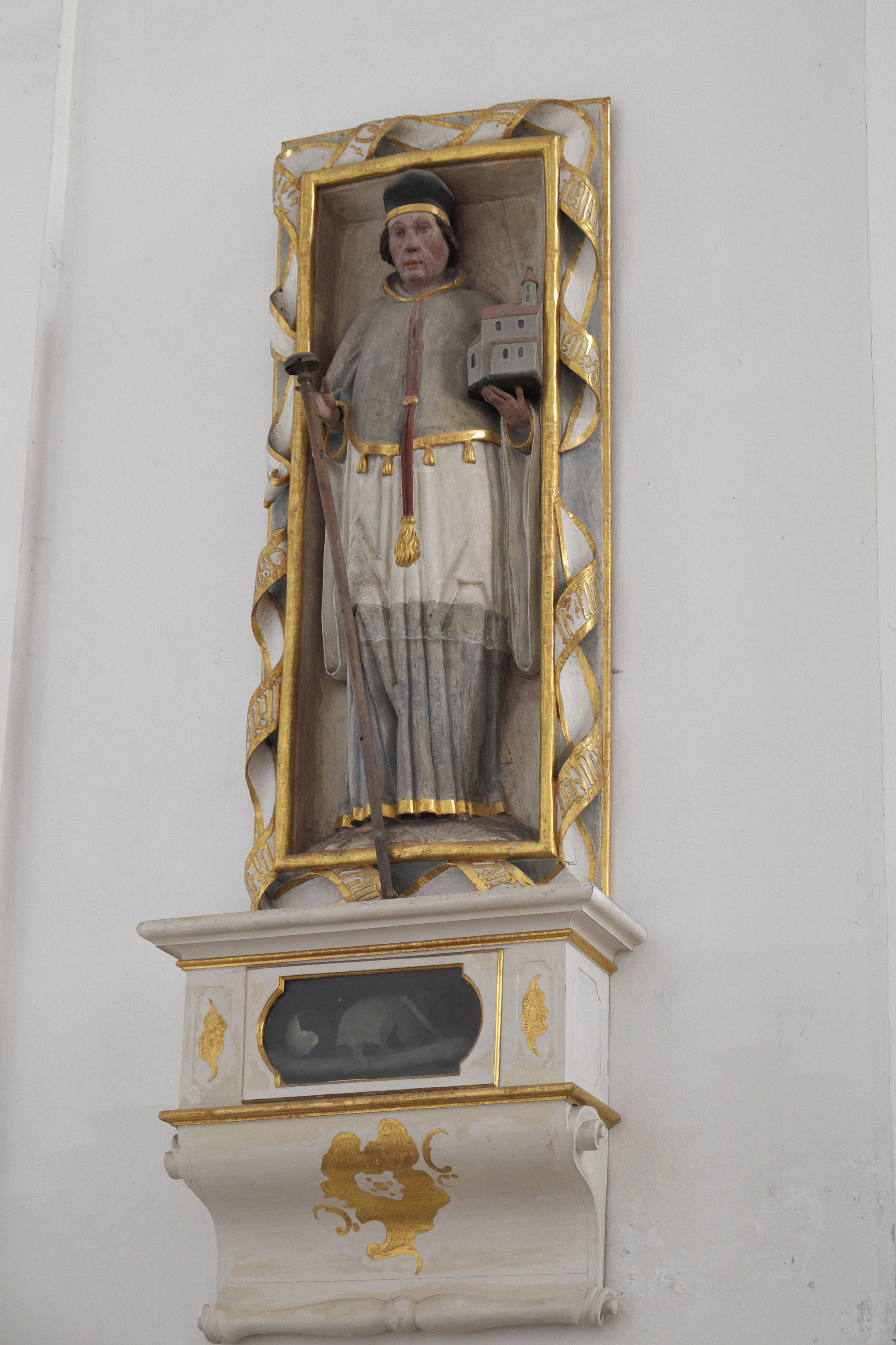 Kirche Mariä Himmelfahrt des Klosters Dietramszell, einem Ortsteil der Gemeinde Dietramszell im Landkreis Bad Tölz-Wolfratshausen (Bayern/Deutschland), Holztafel mit dem Relief des Gründerprobstes Dietram von 1470